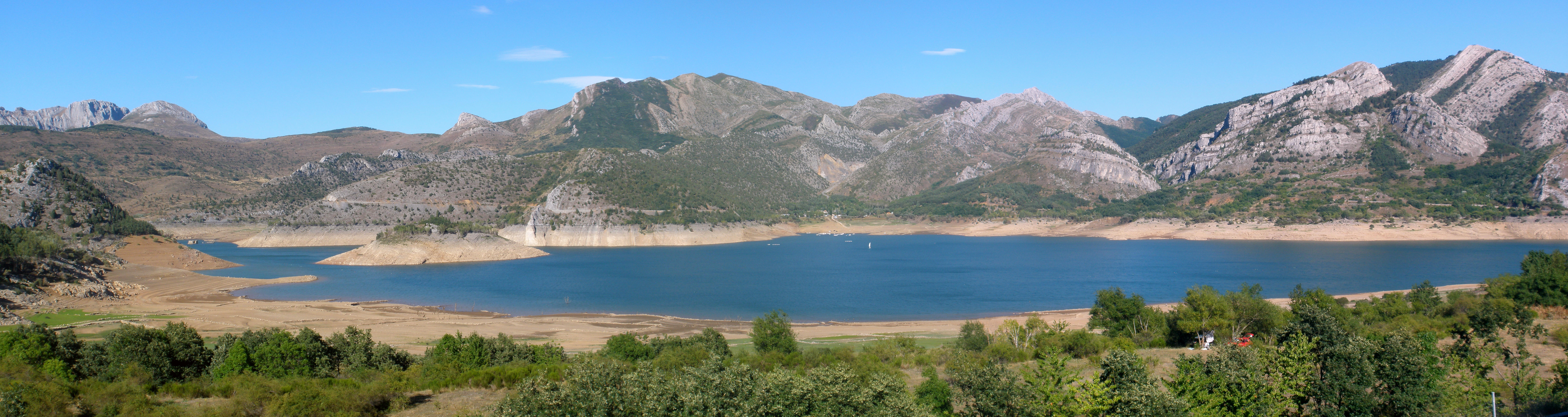 Embalse de Barrios de Luna con elementos de la Montaña Central de León al fondo, visto desde el mirador de la autopista A-66 This is a photography of a Site of Community Importance in Spain with the ID: ES4130050. Natura2000 entry, EEA entry